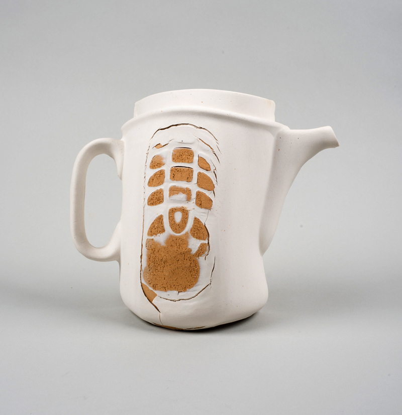 מתוך הפרויקט אזל. חומר קרמי מקומי בשילוב עם פורצלן